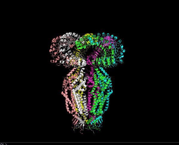 Estructura de la lrrc8a conseguida con plymol